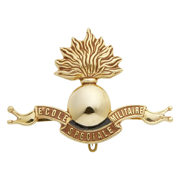 Insigne de béret de l'Ecole spéciale militaire de saint Cyr Coetquidan.